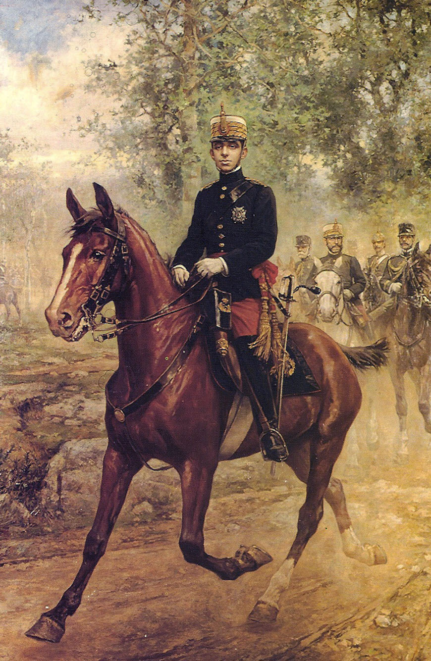 Retrato ecuestre del rey Alfonso XIII de España (1886-1941).